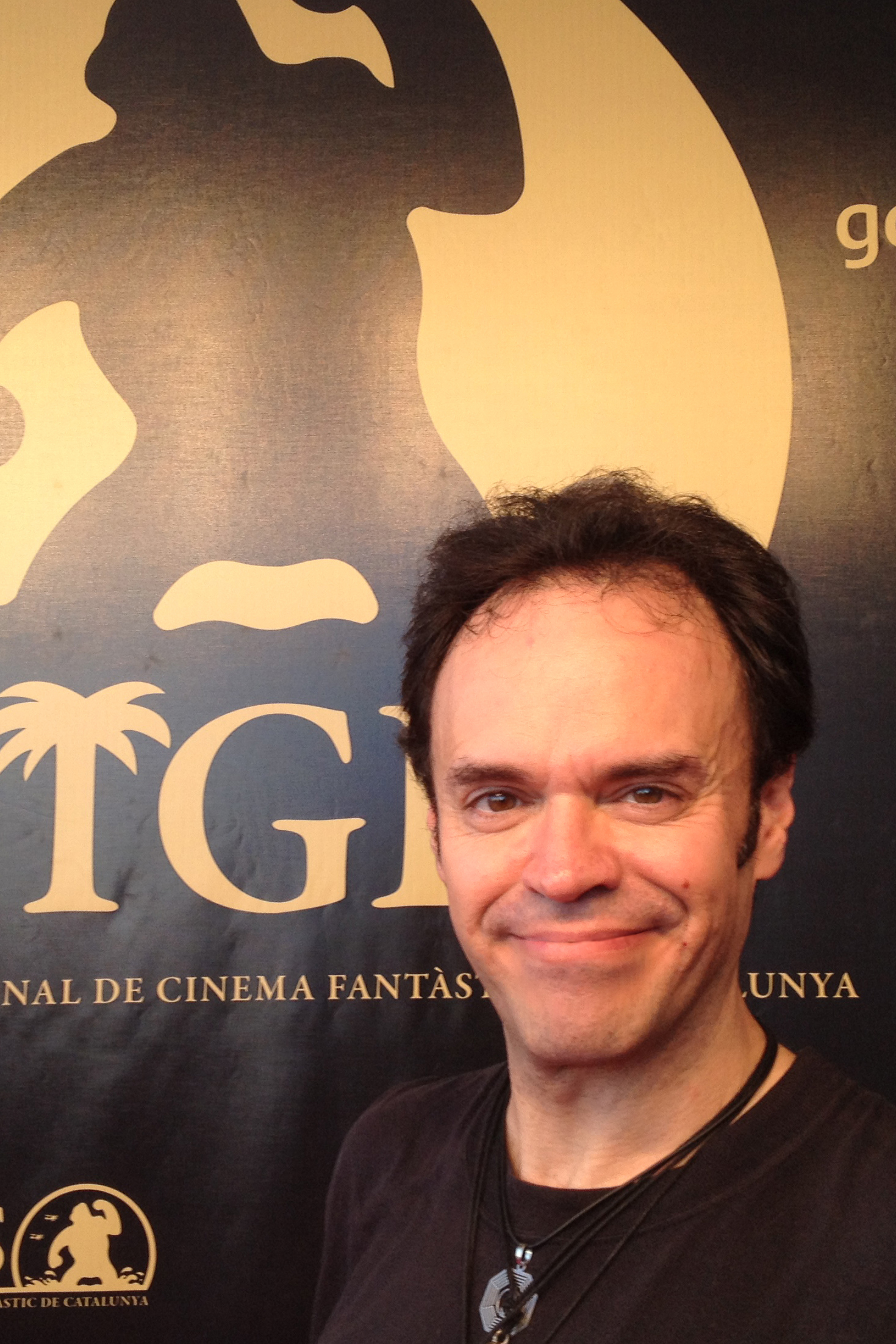 Rafa Casette en el Festival de Sitges 2012